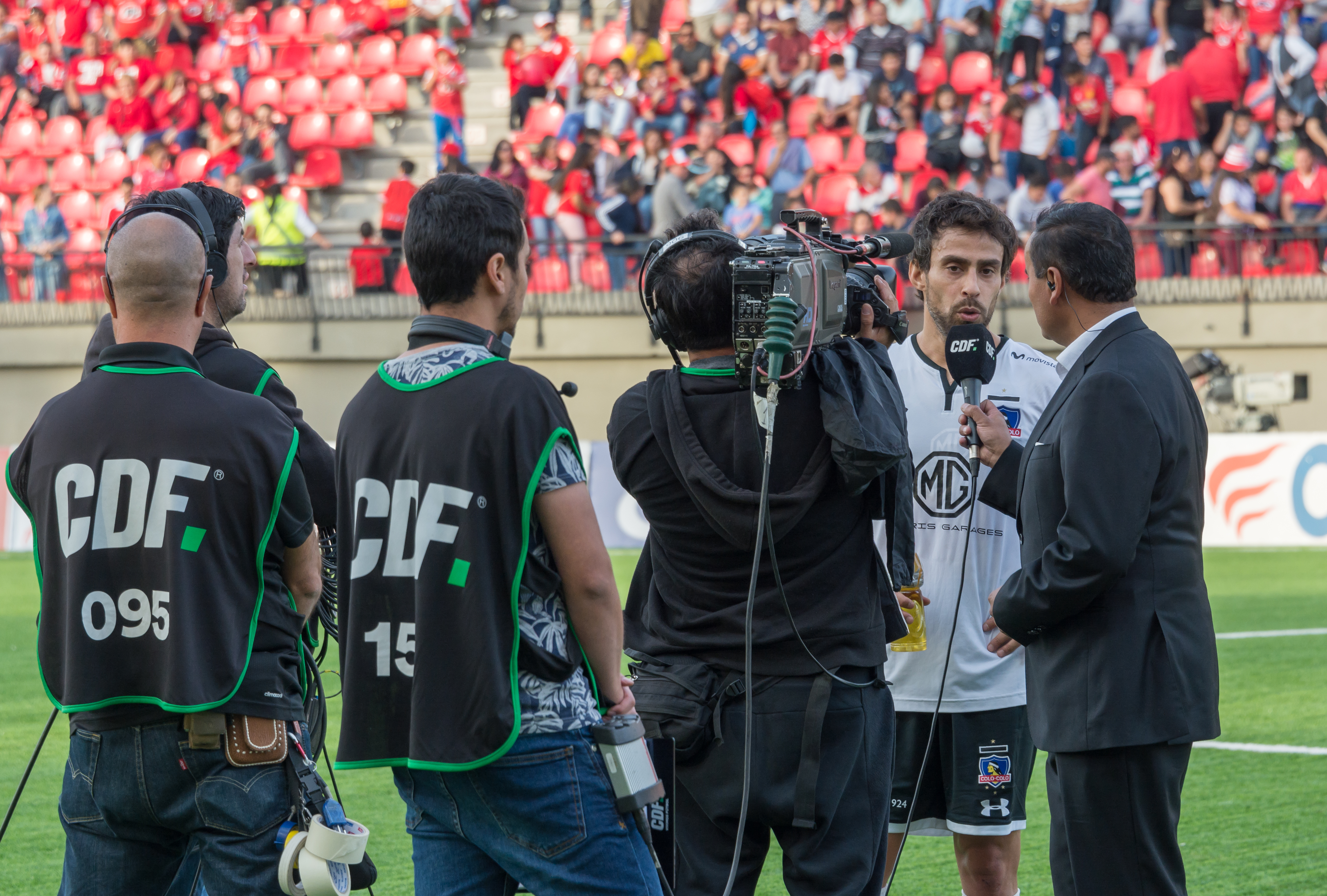 Jorge Valdivia entrevistado al final del encuentro, Unión La Calera v Colo-Colo, Estadio Municipal Nicolás Chahúan Nazar, La Calera, Región de Valparaíso, Chile.